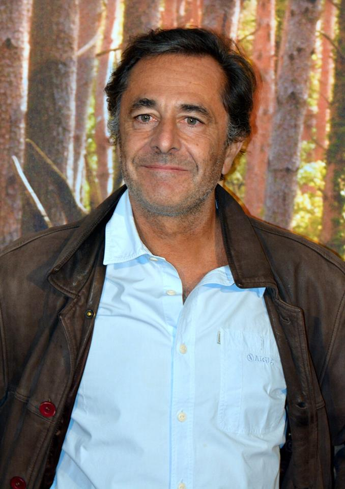 Nicolas Vanier à l'avant-première du film "L'école buissonnière"